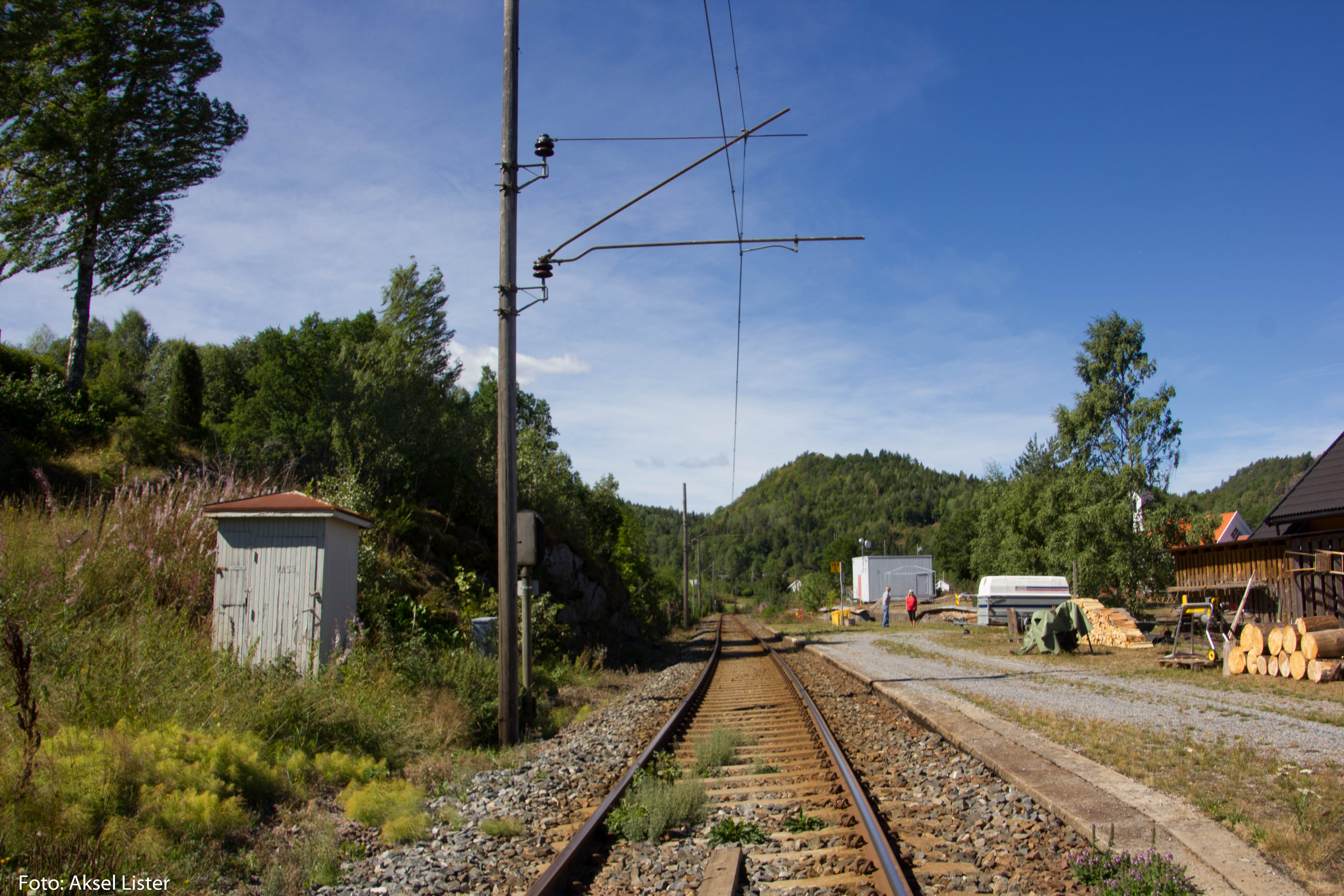 Banen igjennom stasjonen.